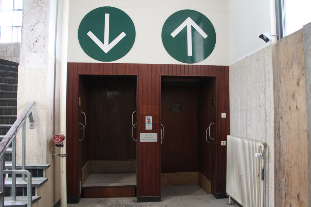 De paternosterlift in het HaKa-gebouw aan de Vierhavensstraat in Rotterdam. De lift staat normaal stil, maar is nog wel werkend. Alleen samen met de gebouwbeheerder kan er van de lift gebruik gemaakt. Zelfstandig mag de lift niet gebruikt worden, aangezien de lift momenteel niet meer veilig wordt geacht. Gezien de historische waarde blijft de lift voorzover mogelijk werkzaam.